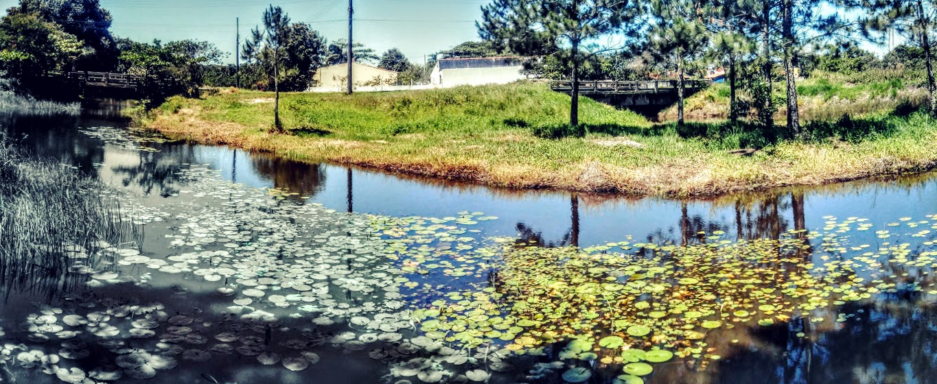 Balneário Viareggio em Ilha Comprida - SP, Brasil.